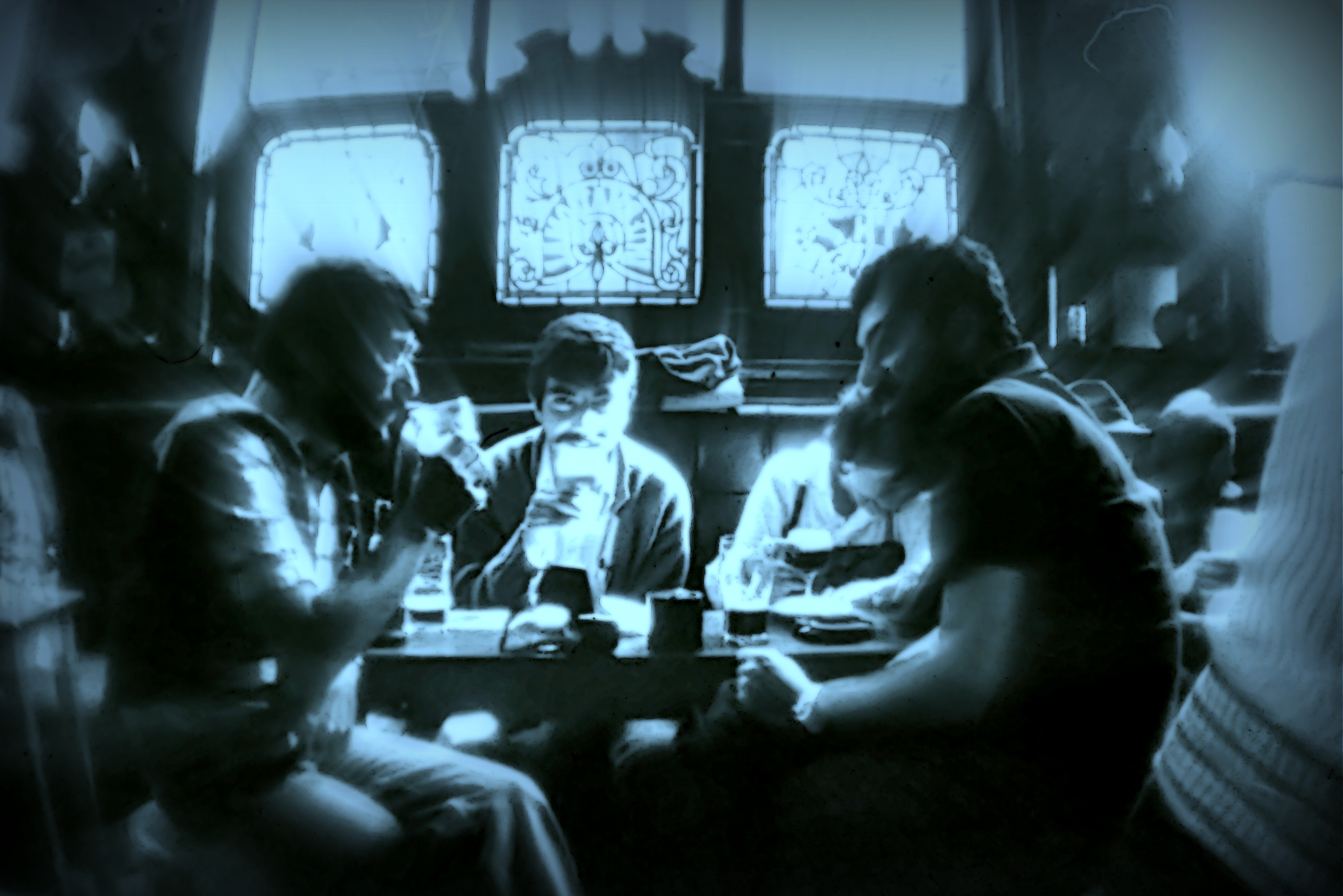 De derecha a izquierda: Enric Miralles - Neus Solé - Marcià Codinach - Daniel Navas - Dublin 1977 "Generación de los 80"